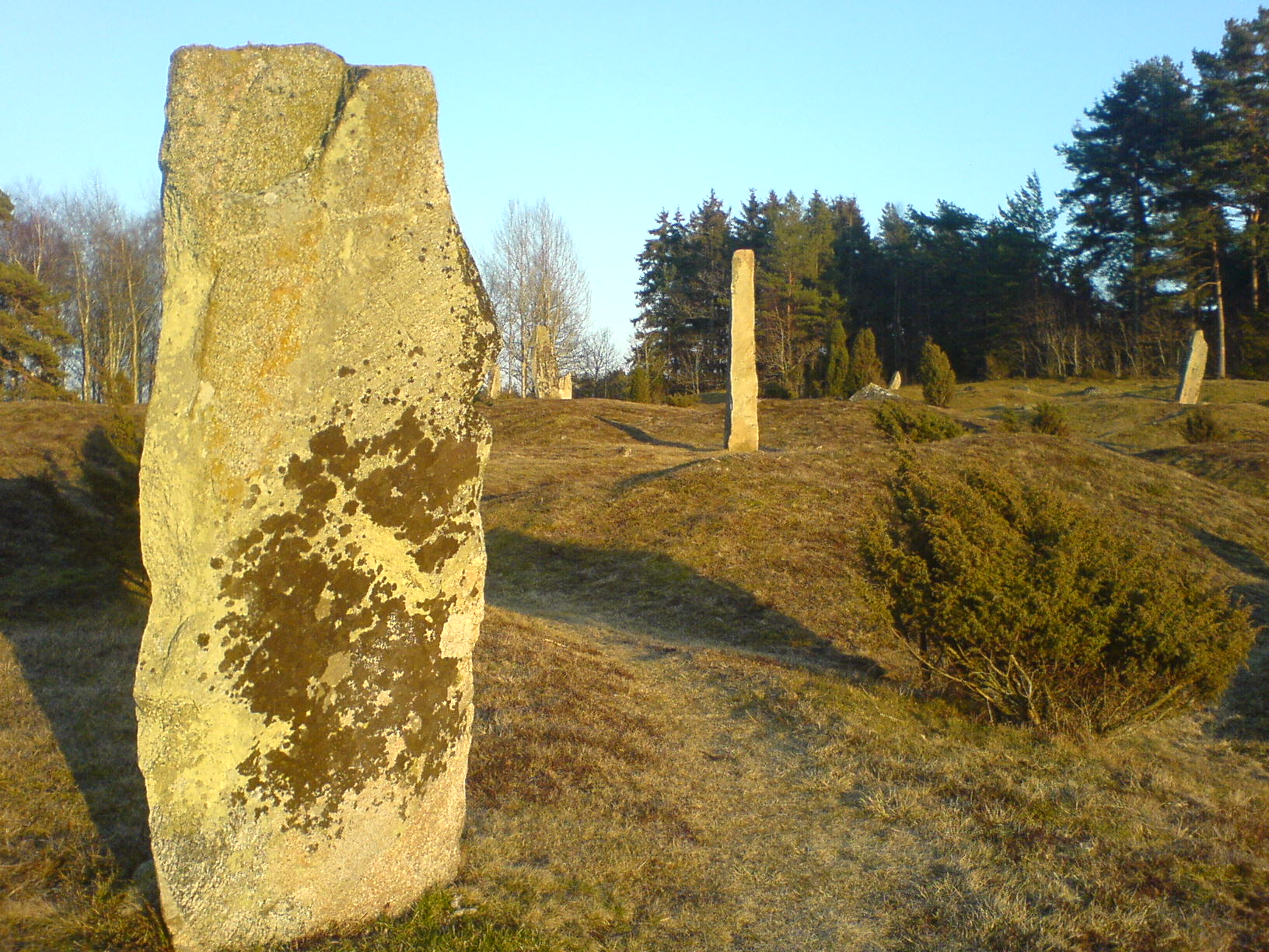 Greby gravfält (RAÄ-nummer Tanum 734:1) i Tanums socken, Bohuslän, Västra Götaland, Sverige.